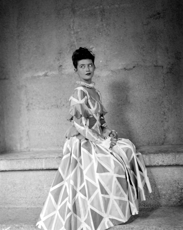 Susi Nicoletti als Smeraldina in Der Diener zweier Herren von Carlo Goldoni. Inszenierung von Hermann Thimig. Salzburger Festspiele 1946, Felsenreitschule